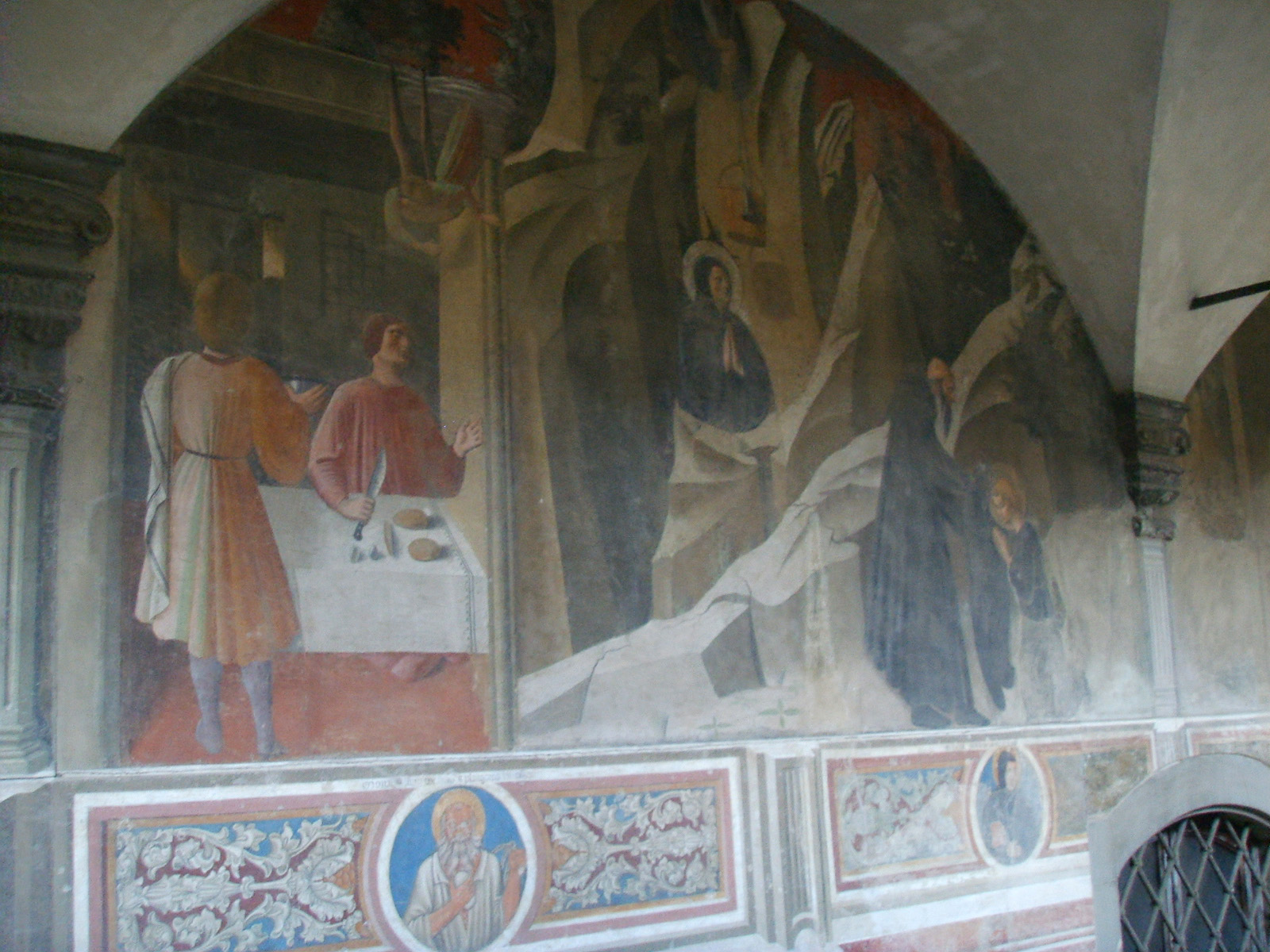 Badia_Fiorentina,_chiostro degli aranci, Storie di San Benedetto, XV century, by Giovanni da Consalvo, portuguese master